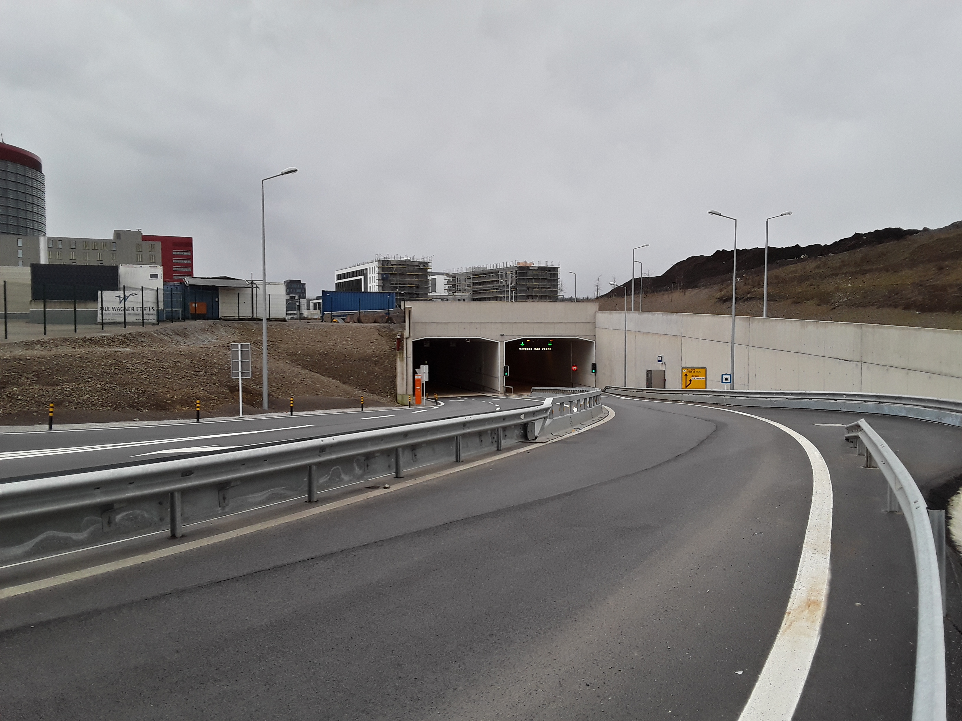 Liaison Micheville B40: Accès nord du tunnel